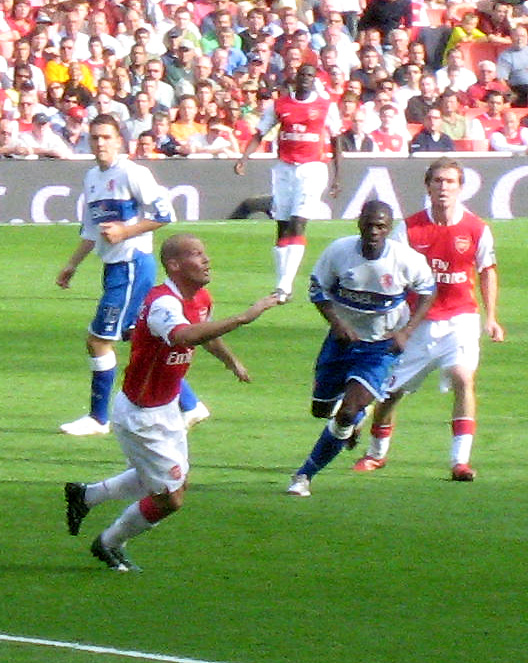 Cropped version of Image:Fredrik Ljungberg Arsenal.jpg